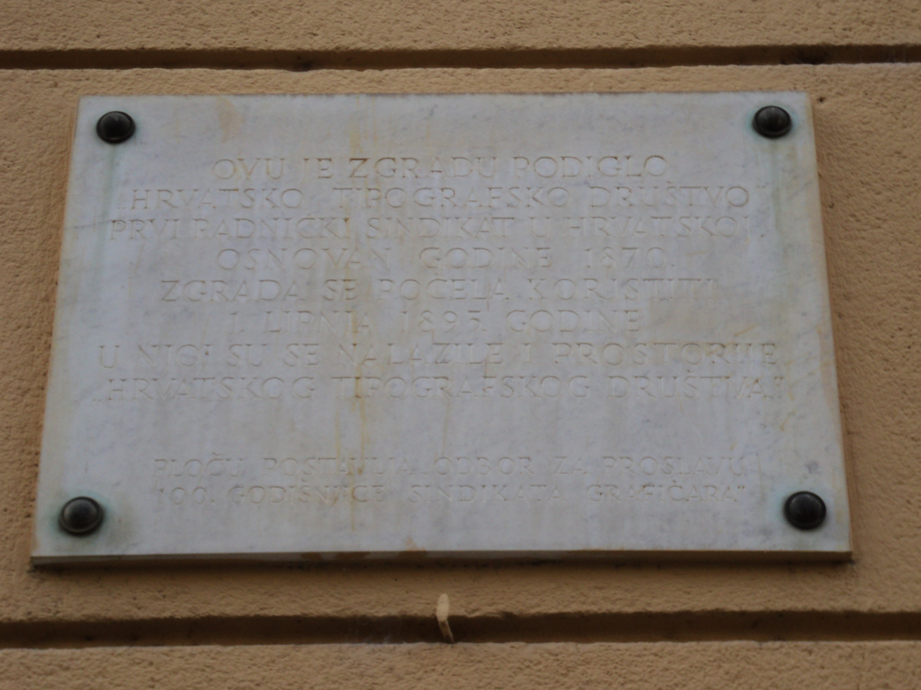 Zgrada u Primorskoj ulici u Zagrebu u kojoj je 1870. osnovan i delovao Sindikat tipografskih radnika.